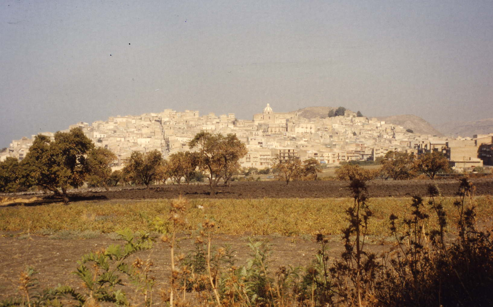 image par contributeur, Dingy